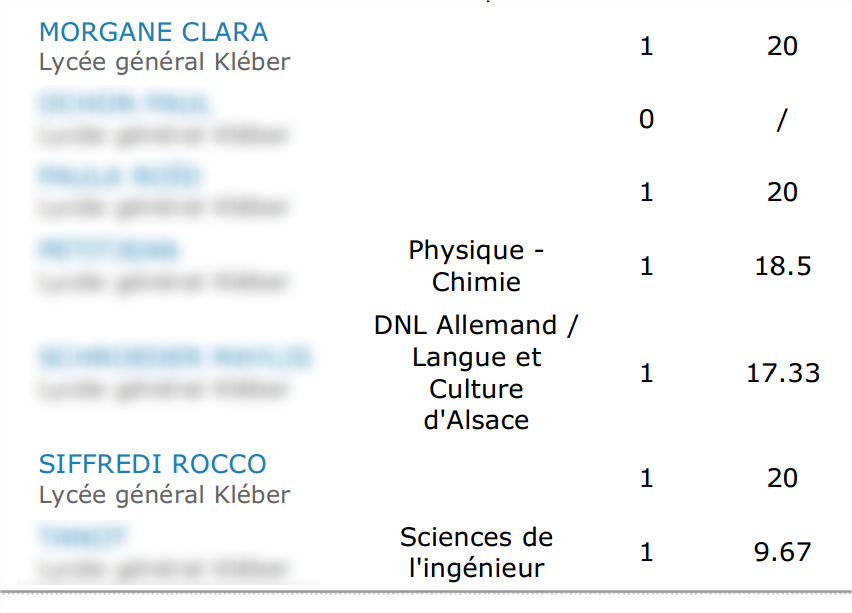 Exemple de ce qu'on pouvait trouver sur le site note2be.fr.